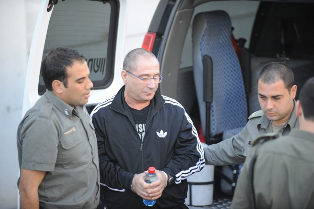 מאיר אברג'יל במהלך הסגרתו לארצות הברית. צילום: מערך דובר המשטרה